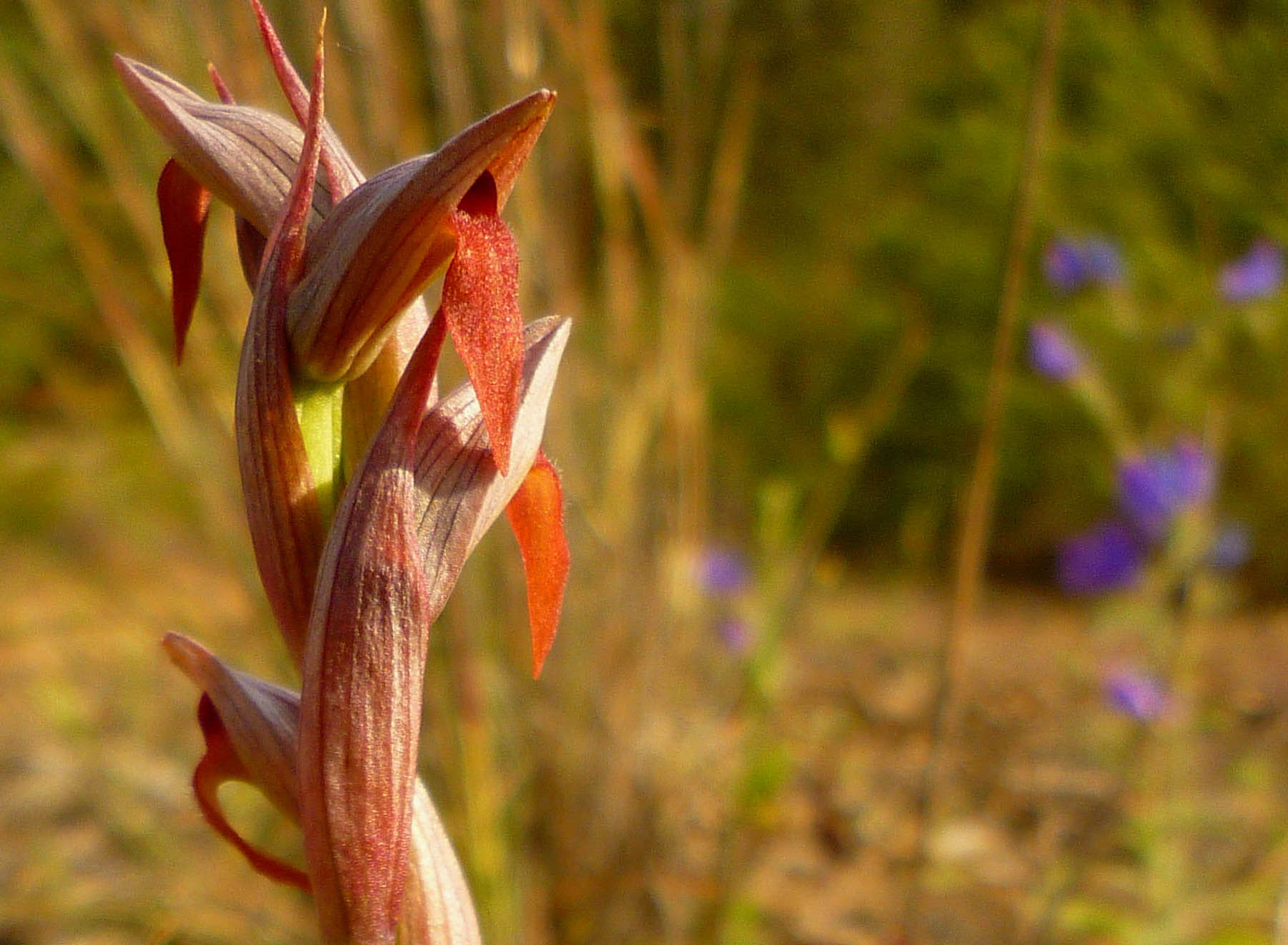 Serapias parviflora en la sierra minera de Cartagena, España.